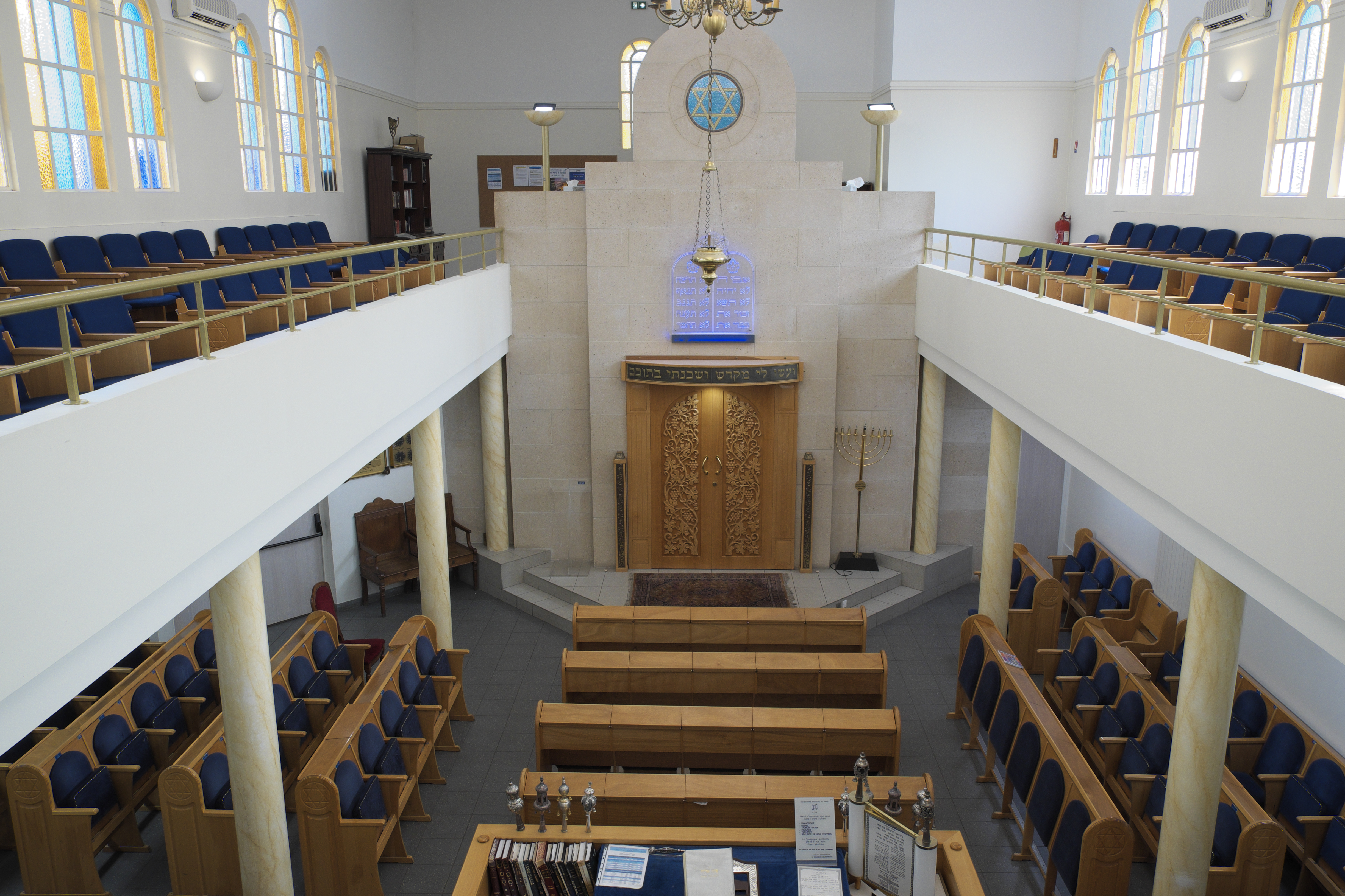 Synagoge in Le Raincy im Département Seine-Saint-Denis (Île-de-France/Frankreich), Innenraum